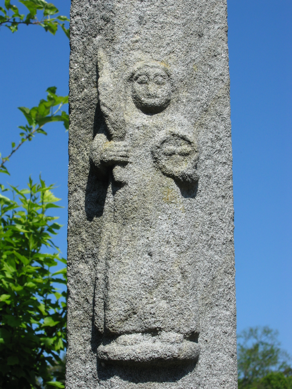 Relevo no fuste dun cruceiro en Paradela, parroquia de Meaño (Pontevedra), representando a Santa Lucía